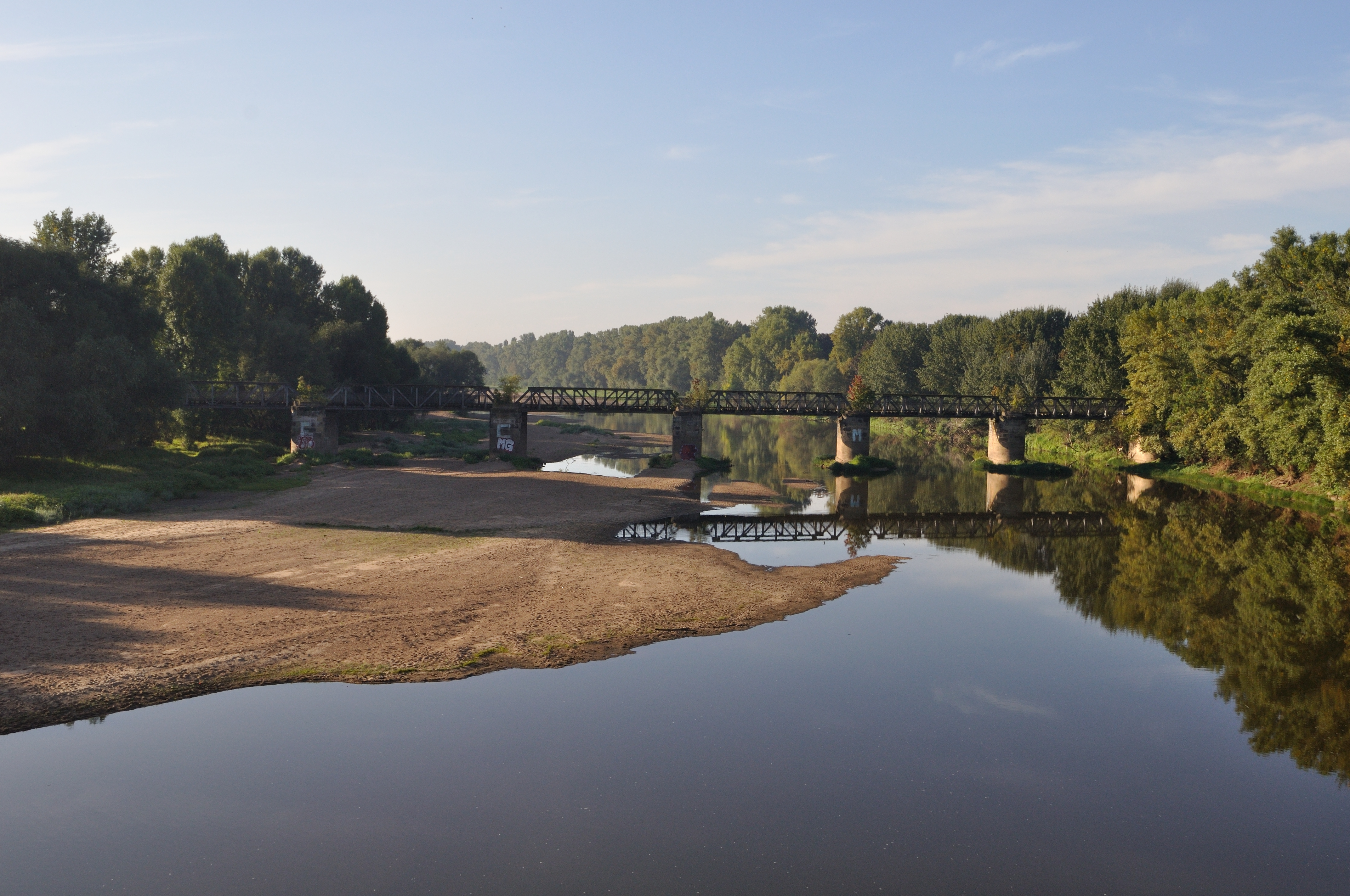 Eisenbahnbrücke der stillgelegten Eisenbahnlinie Magdeburg-Potsdam über die Alte Elbe in Magdeburg. This is a photograph of an architectural monument.It is on the list of cultural monuments of Magdeburg